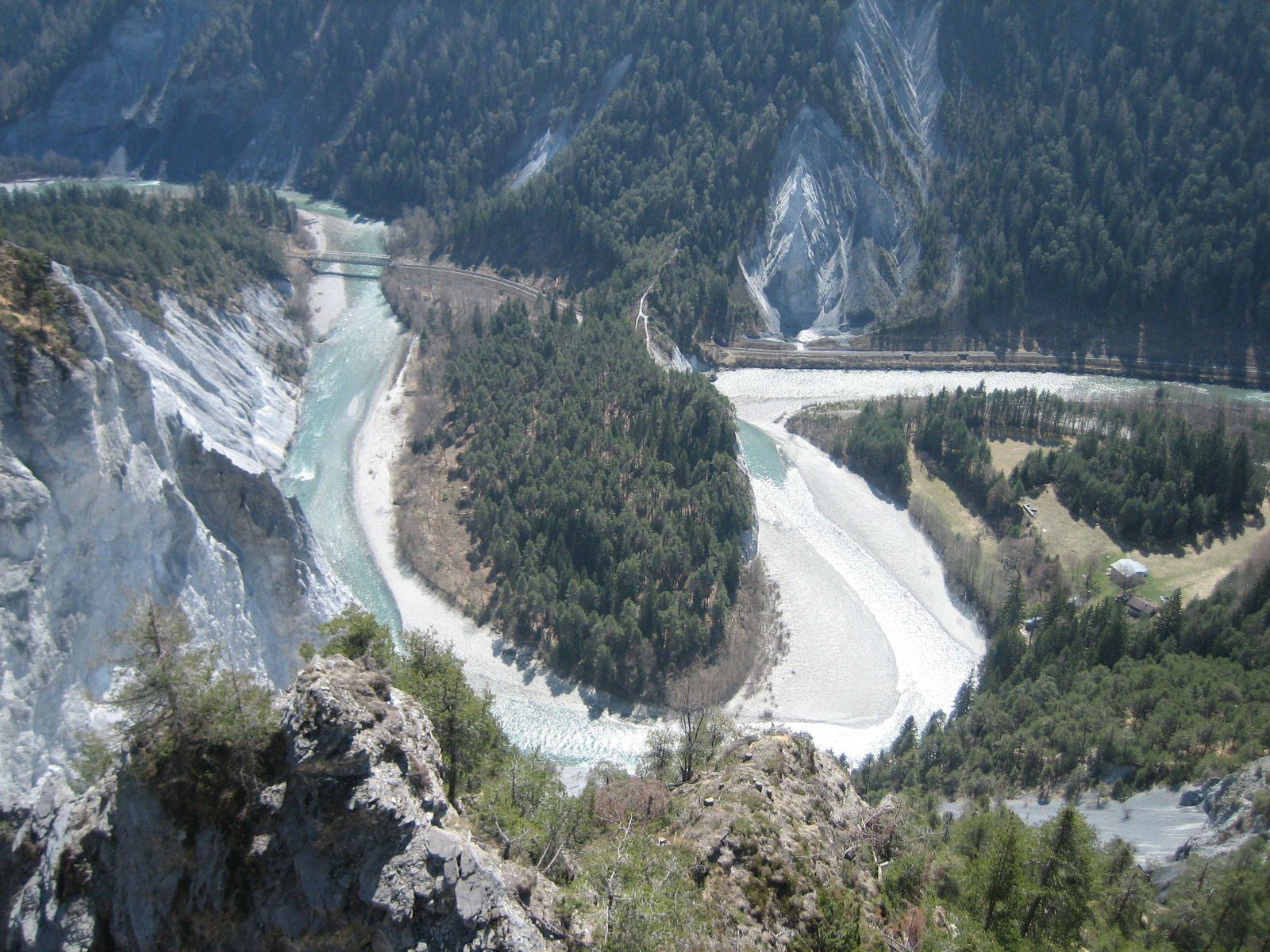 Ruinaulta unterhalb Films Conn